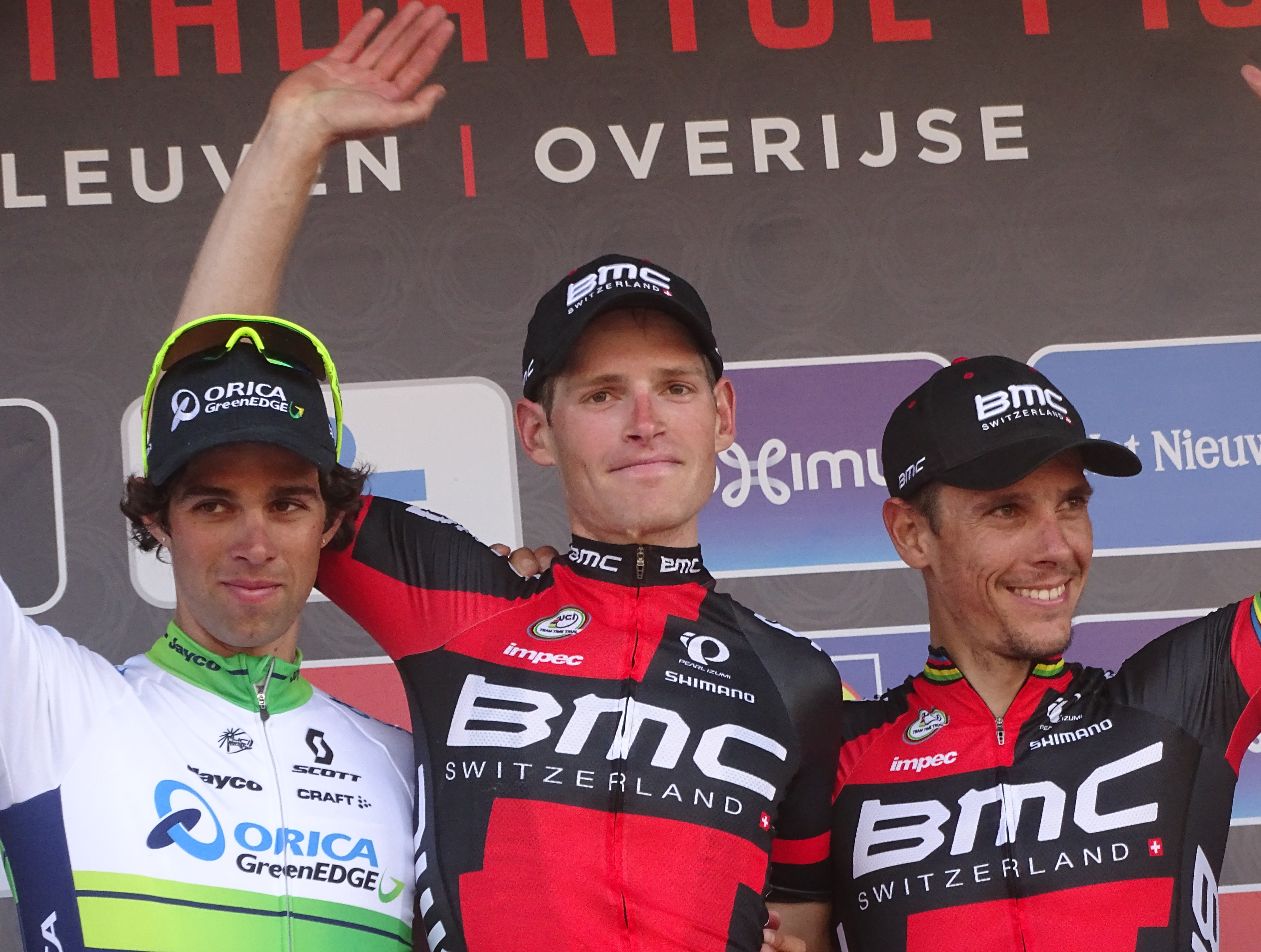 Reportage réalisé le mercredi 15 avril à l'occasion de l'arrivée de la Flèche brabançonne 2015 à Overijse, Belgique.